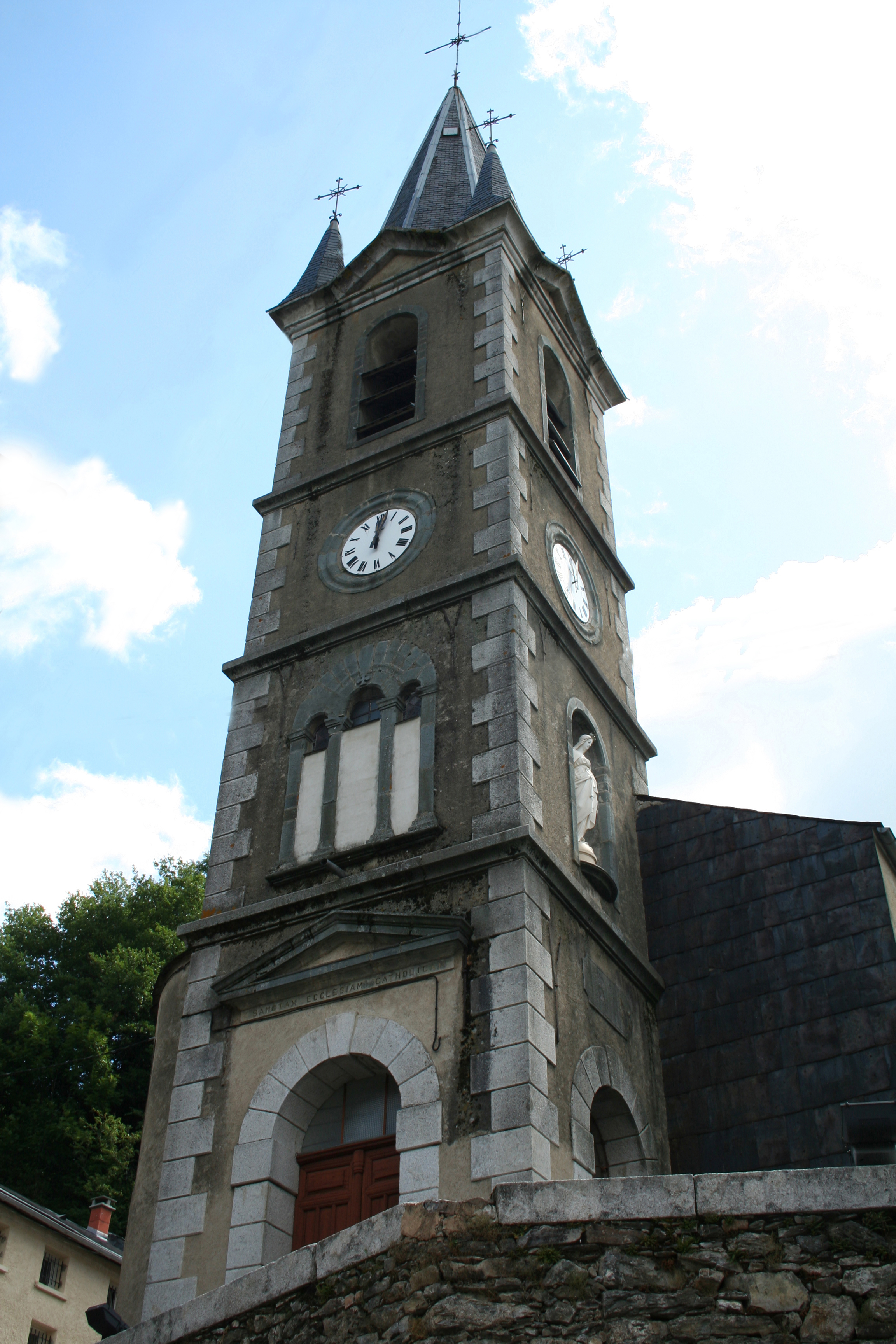 Viane (Tarn) - clocher de l'église Notre-Dame.